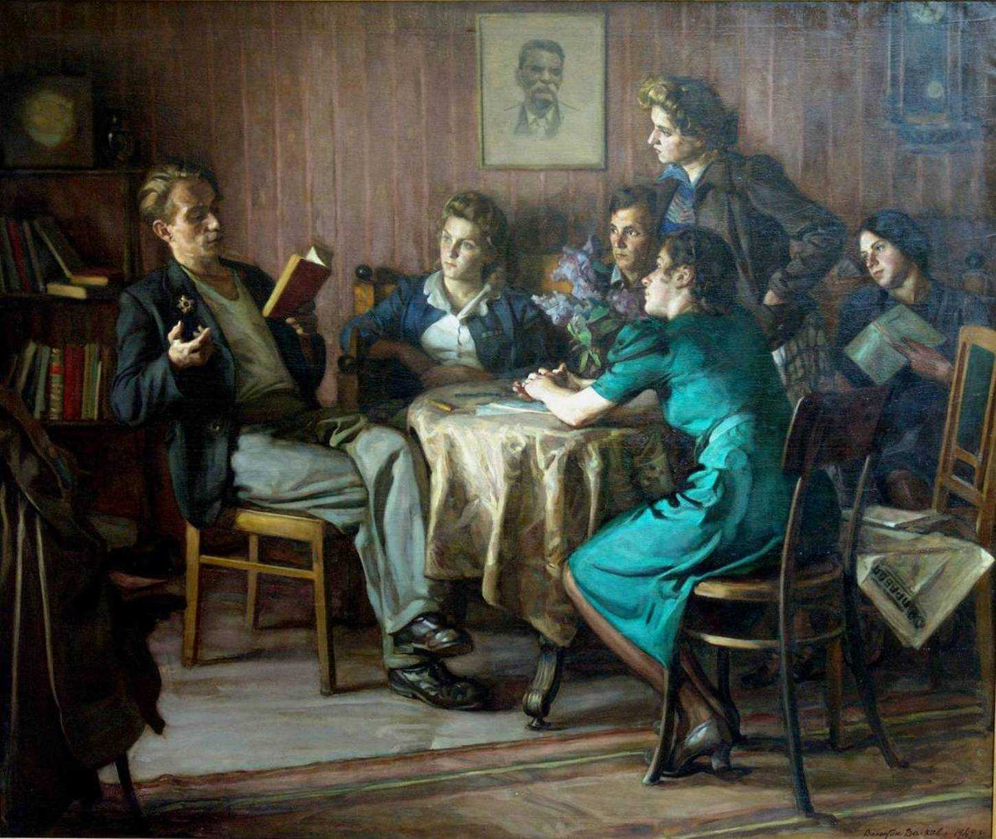 Students